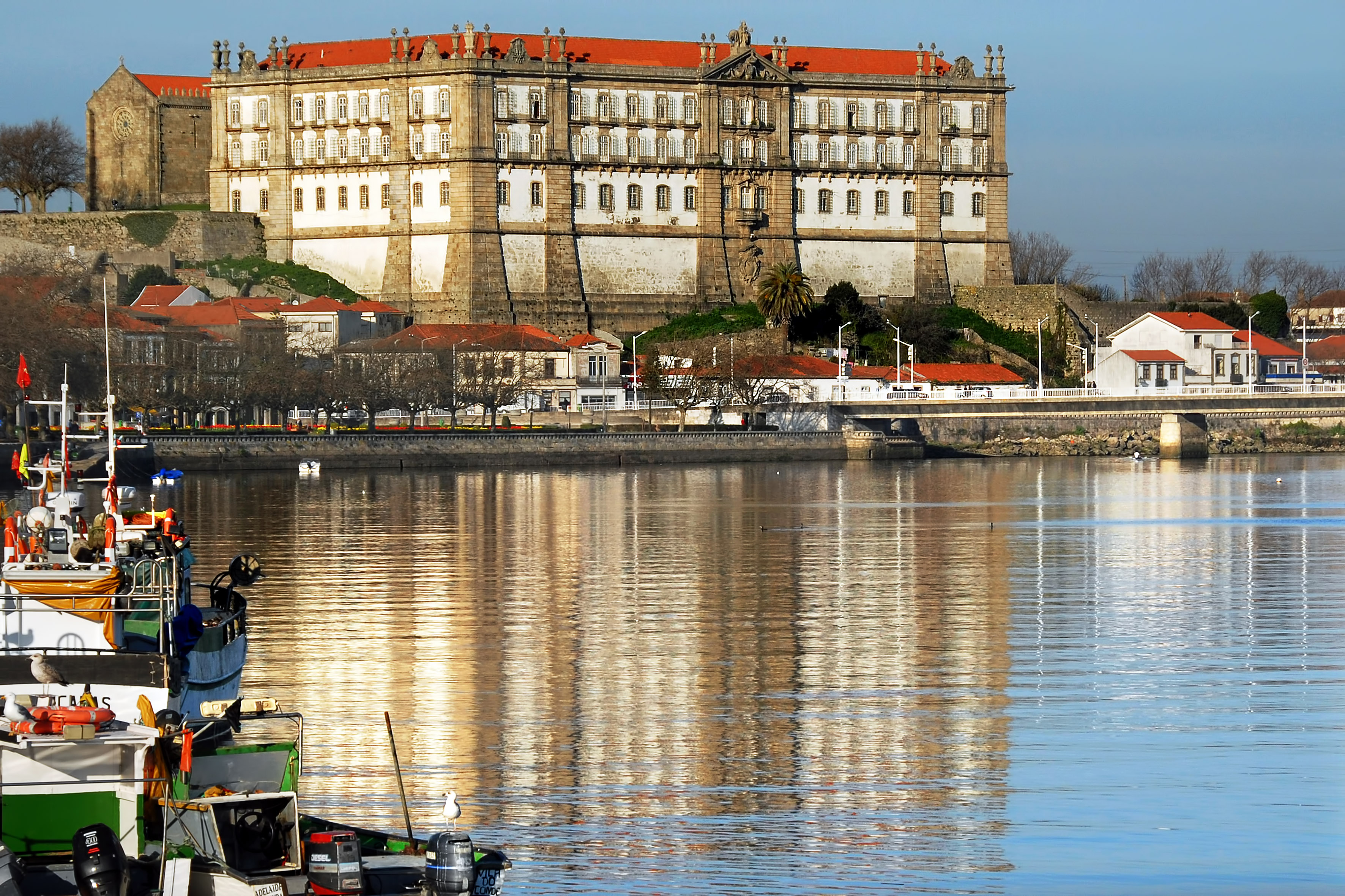 Vila do Conde - Mosteiro de Santa Clara This file was uploaded for Wiki Loves Monuments in Portugal with the unique identifier 97020692.